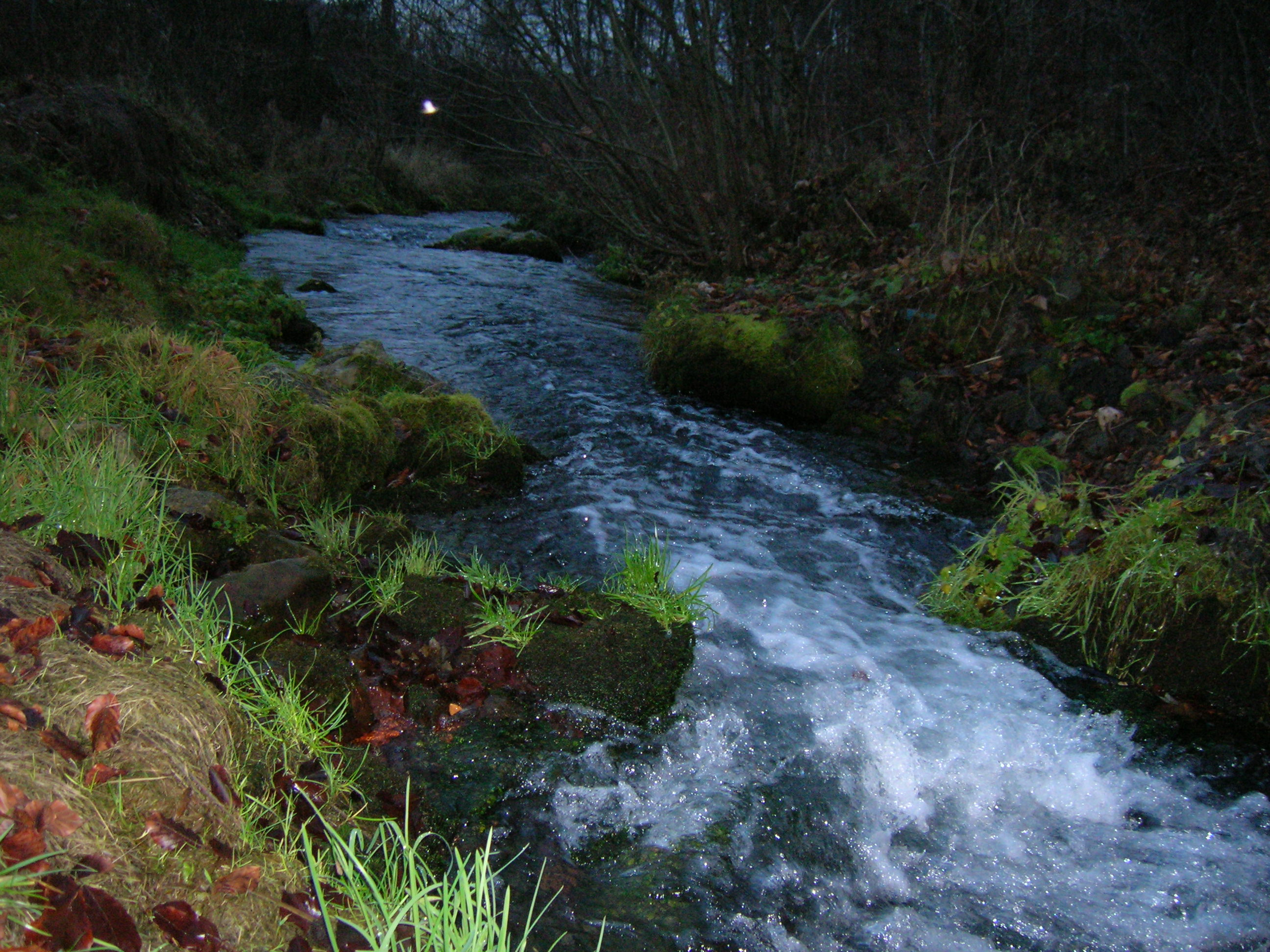 Racławka.Dubie